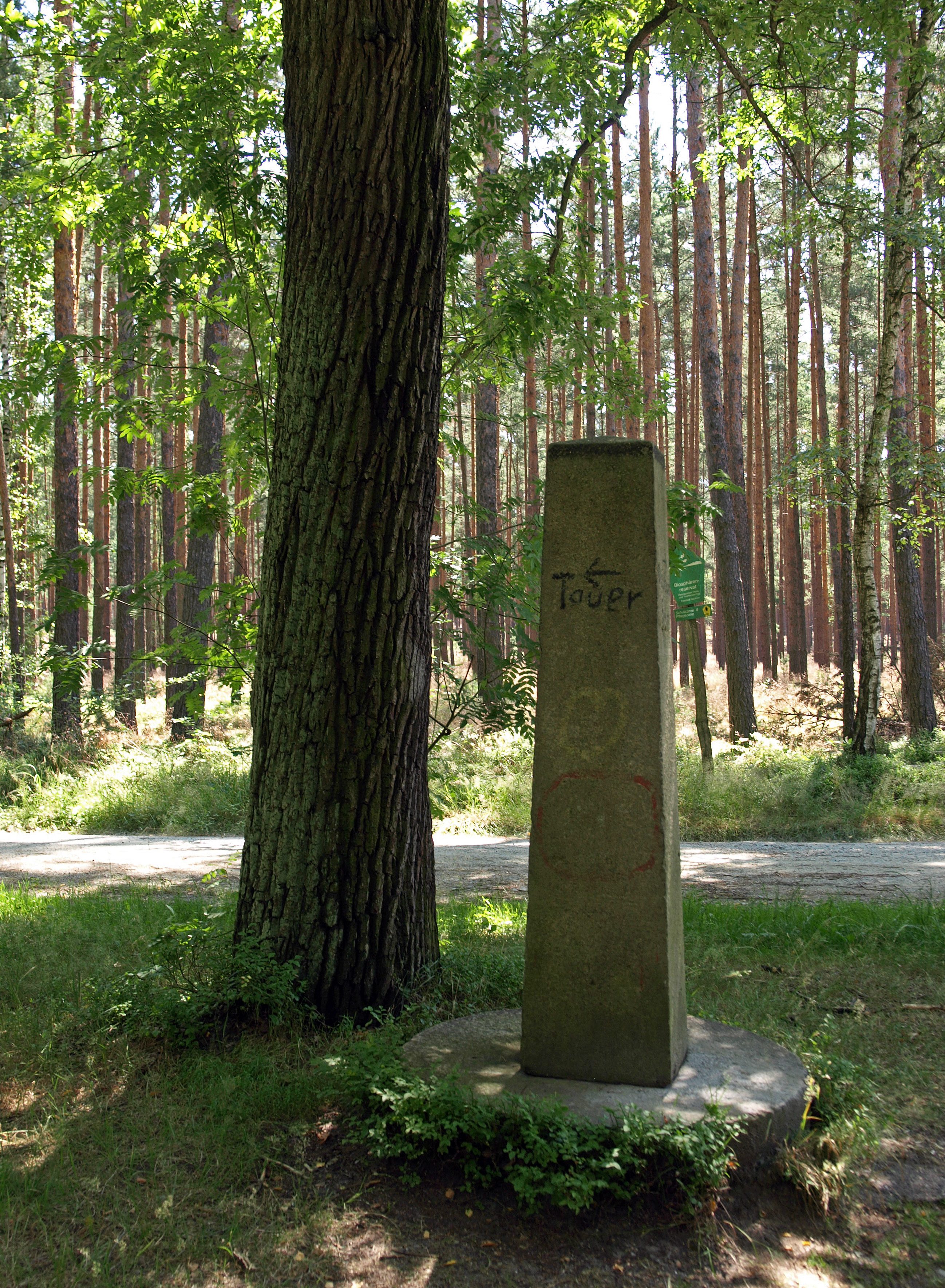 Nach der Einführung des Metrischen Systems im Deutschen Reich im Jahr 1871 wurde der Stein in der Daubaner Heide als Wegweisersäule aufgestellt.